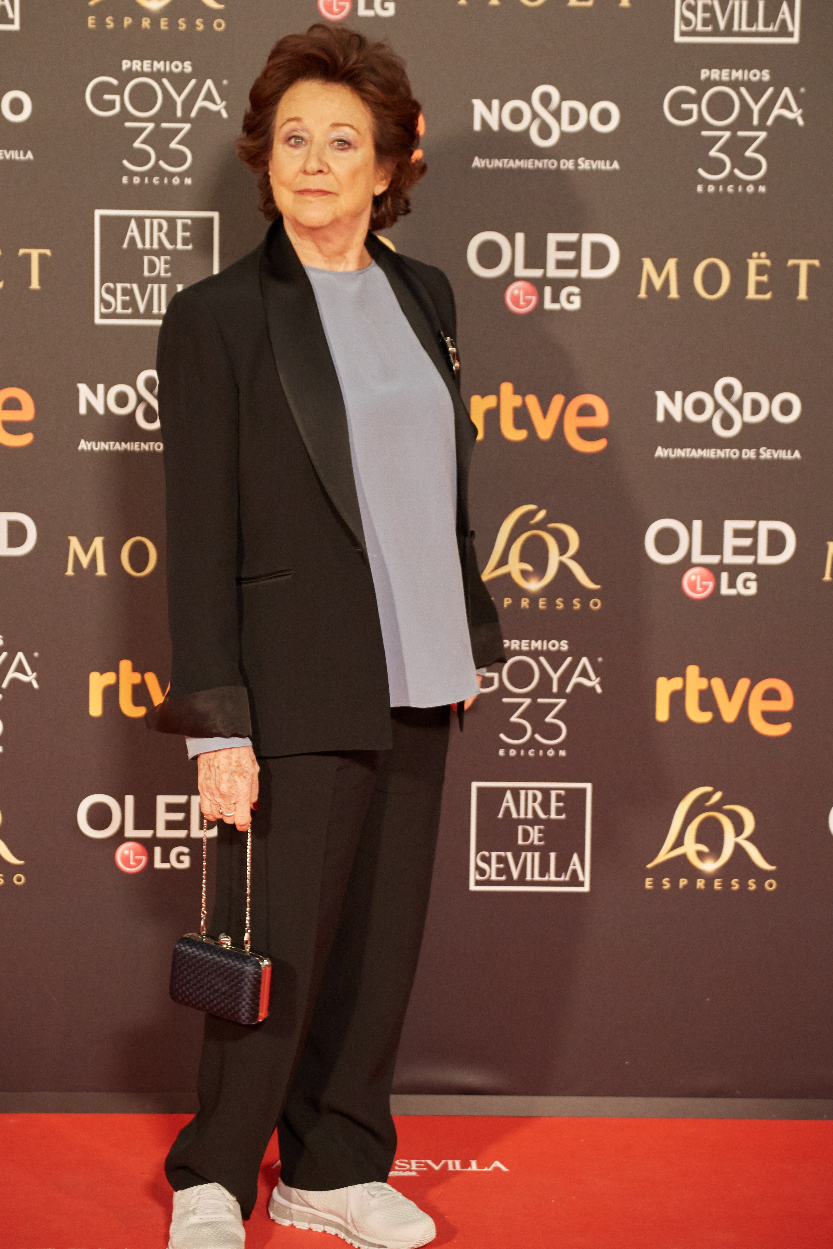 Julieta Serrano en la alfombra roja de los Premios Goya celebrados en Sevilla en Febrero 2019